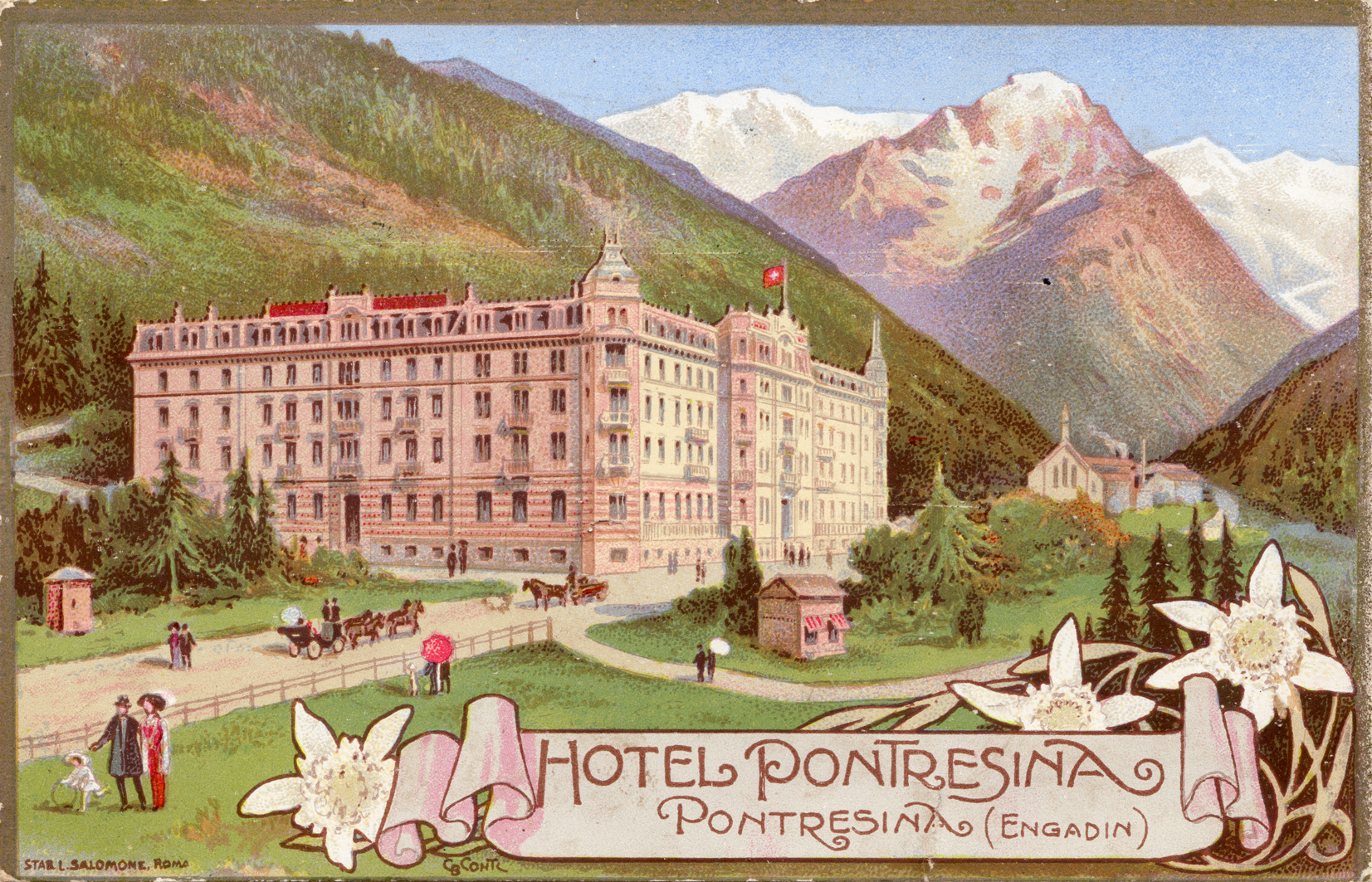 Ansichtskarte Hotel Pontresina, versandt 1918